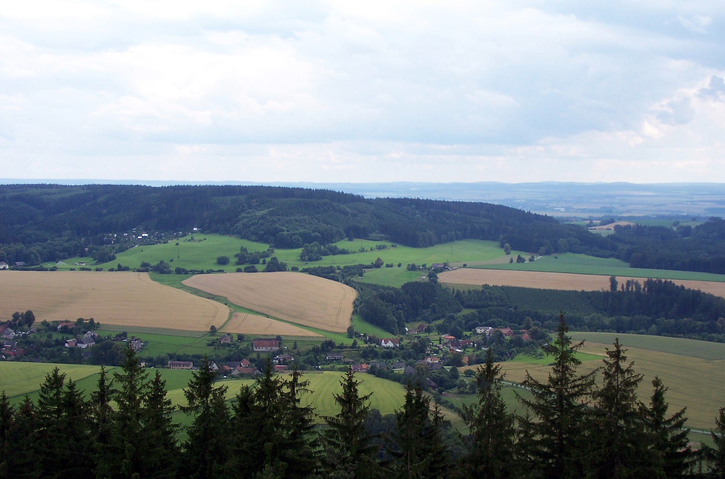 Obec Řetůvka u Ústí nad Orlicí při pohledu z rozhledny Andrlův chlum.